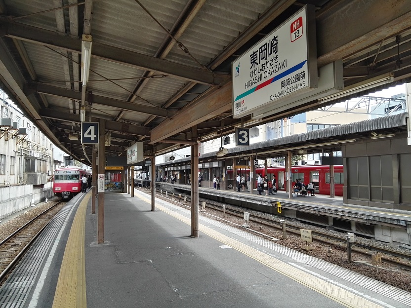 Higashi okazaki station platform